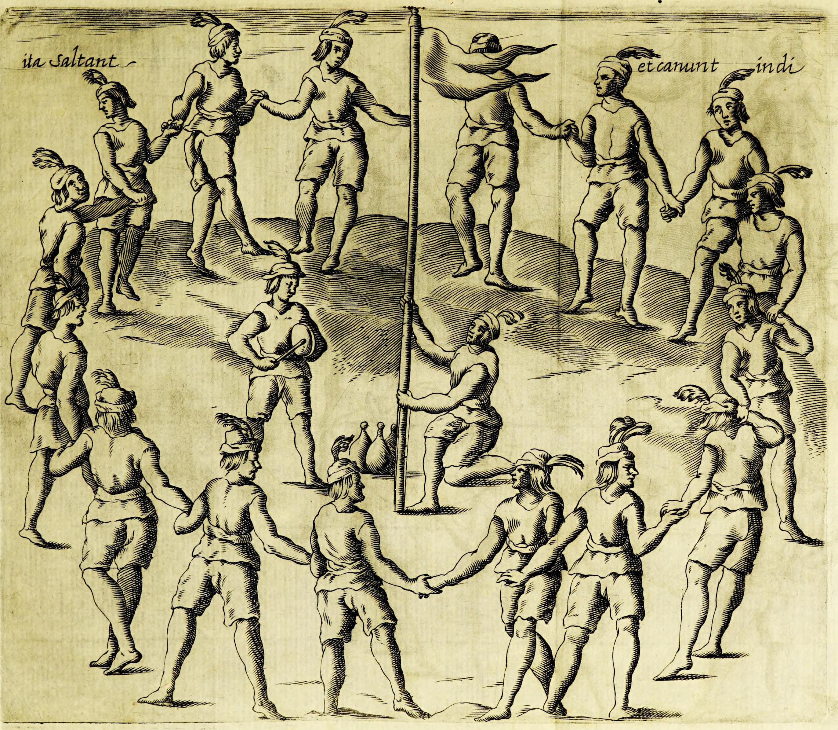 Un nguillatún, rogativa mapuche, 1646. Historica relacion del Reyno de Chile y de las missiones y ministerios que exercita en el la Compañía de Jesus / por Alonso de Ovalle. Roma : Por Francisco Cavallo, 1646. 445, [16] páginas sin numerar, [28] hojas de láminas (algunas plegadas) sin numerar